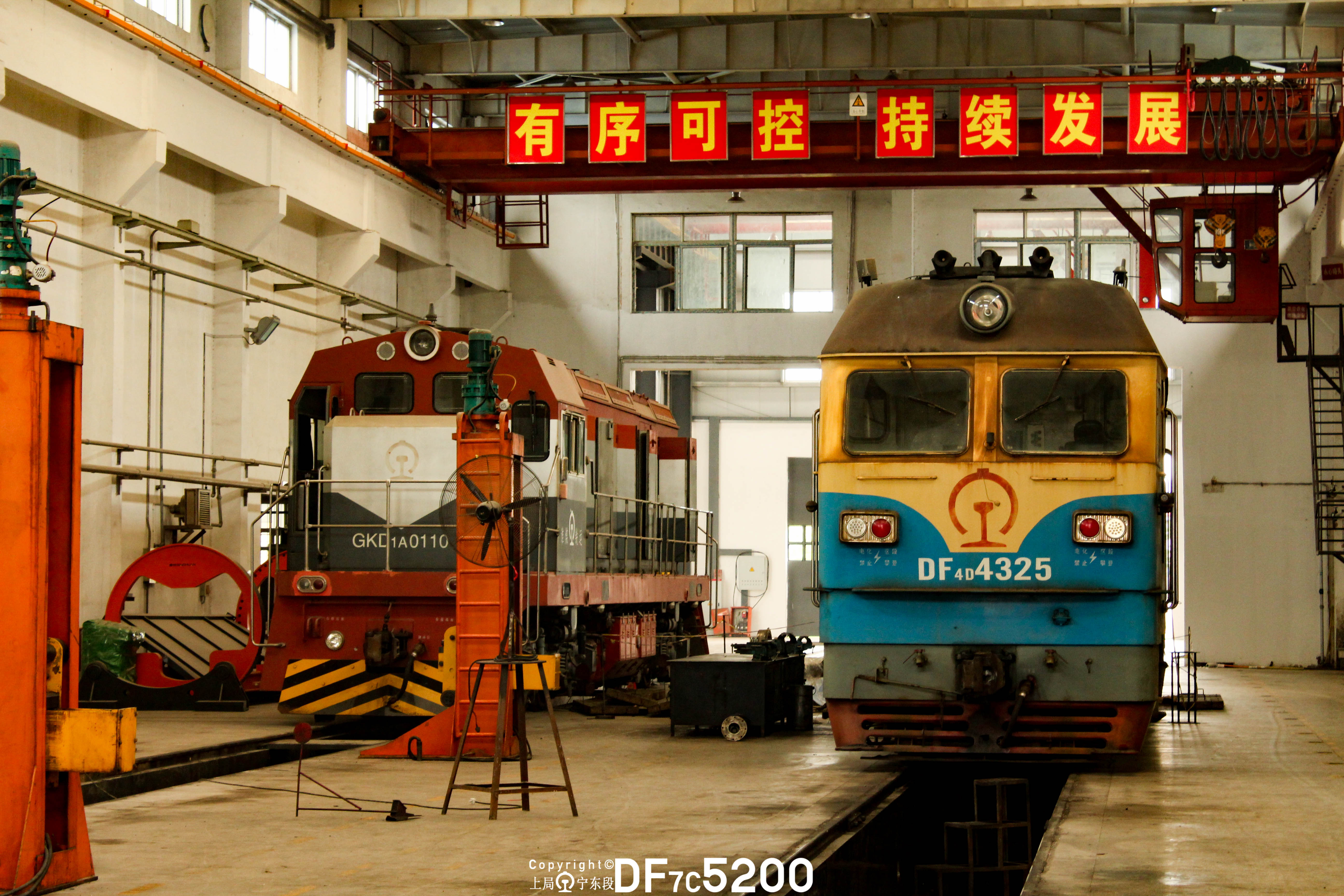 GKD1A-0100&DF4DH-4325 in Huaikuang Tianji Depot